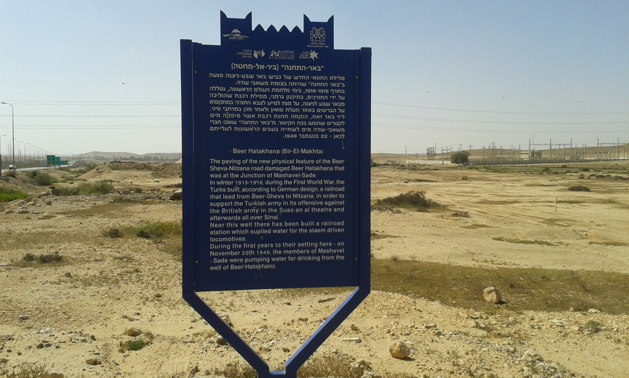 תחנת הרכבת ביר אל מחטה (תחנת הבאר) מצפון לביר עסלוג'